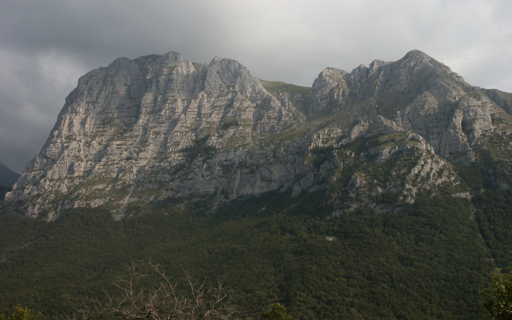 Monte Bove - Monti Sibillini